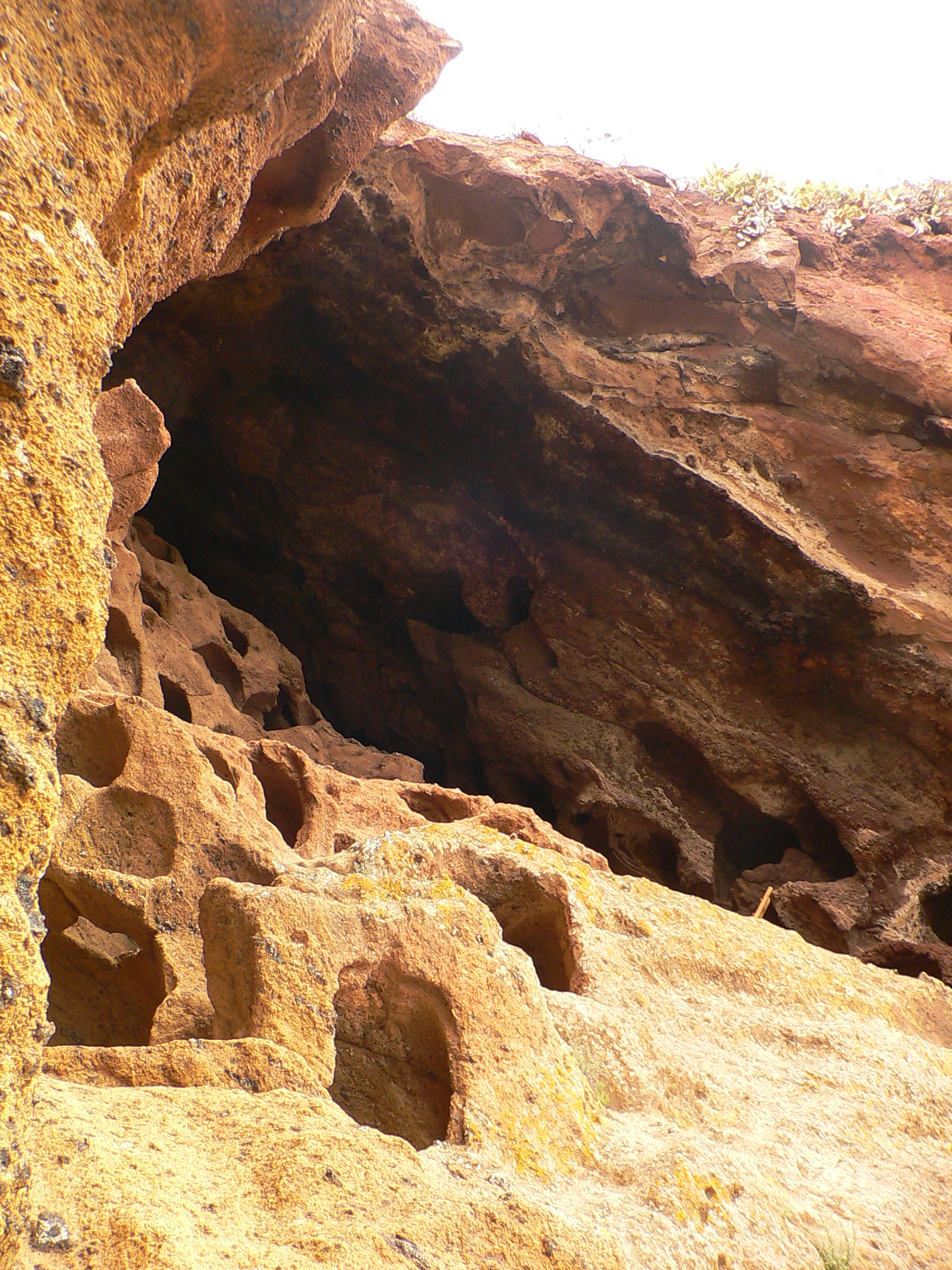 Cenobio de Valerón, cuevas